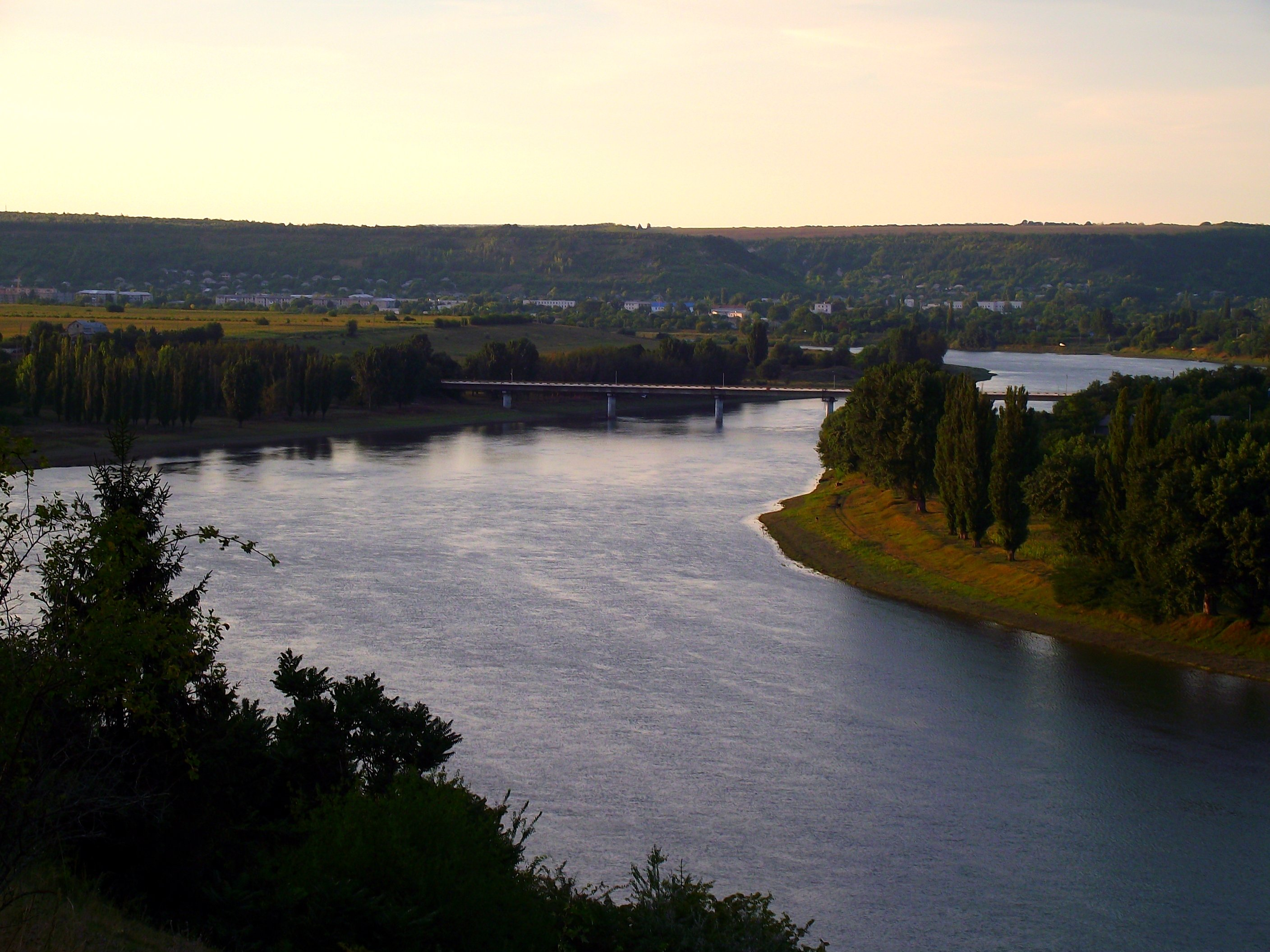 L132, Moldova